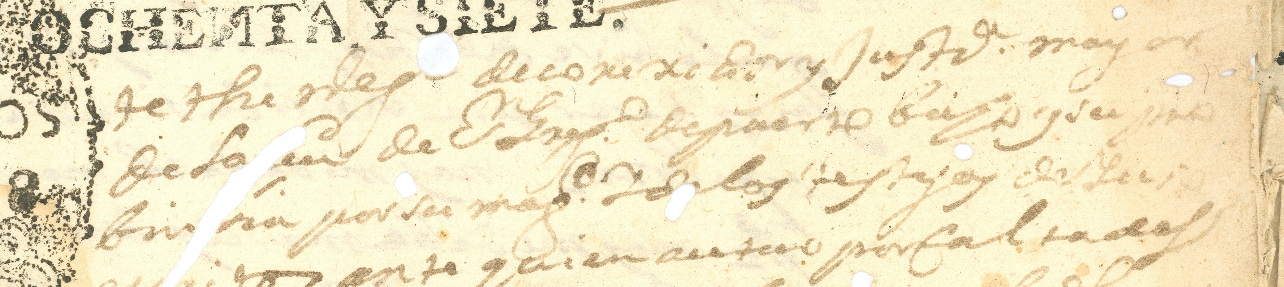 Diapositiva de acceso y disponibilidad pública consultada en los Fondos Documentales pertenecientes al Archivo Histórico del Guayas; Guayaquil, Ecuador. Referencia ortográfica de cuyo escrito lo contiene un manuscrito de custodia patrimonial. (Sección: Portoviejo, Puertoviejo, Puerto Viejo). En la imagen destaca el un párrafo textual donde consta la titulación de la maxima autoridad de la Tenencia de Puerto Viejo: «Capitán Don Juan de Contonente,/ Theniente General de Correxidor y Justicia Mayor de la Ciudad de San Gregorio de Puerto Biejo y Probincia por Su Magestad [...]» (10.VII.1692).Consultado y compartido por el usuario J. Javier García A.